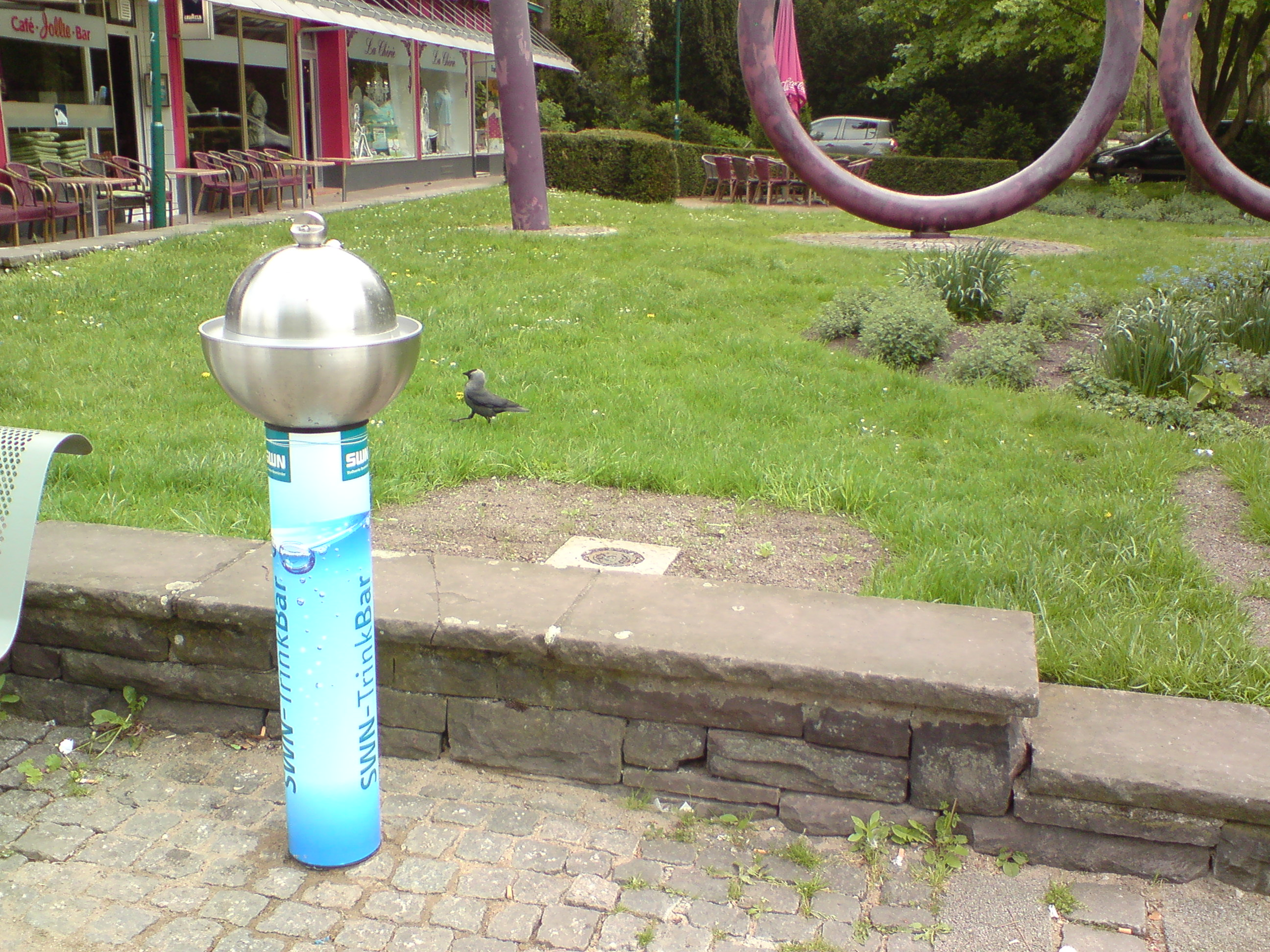 Erster öffentlicher Trinkbrunnen in NMS am 14.Mai eröffnet